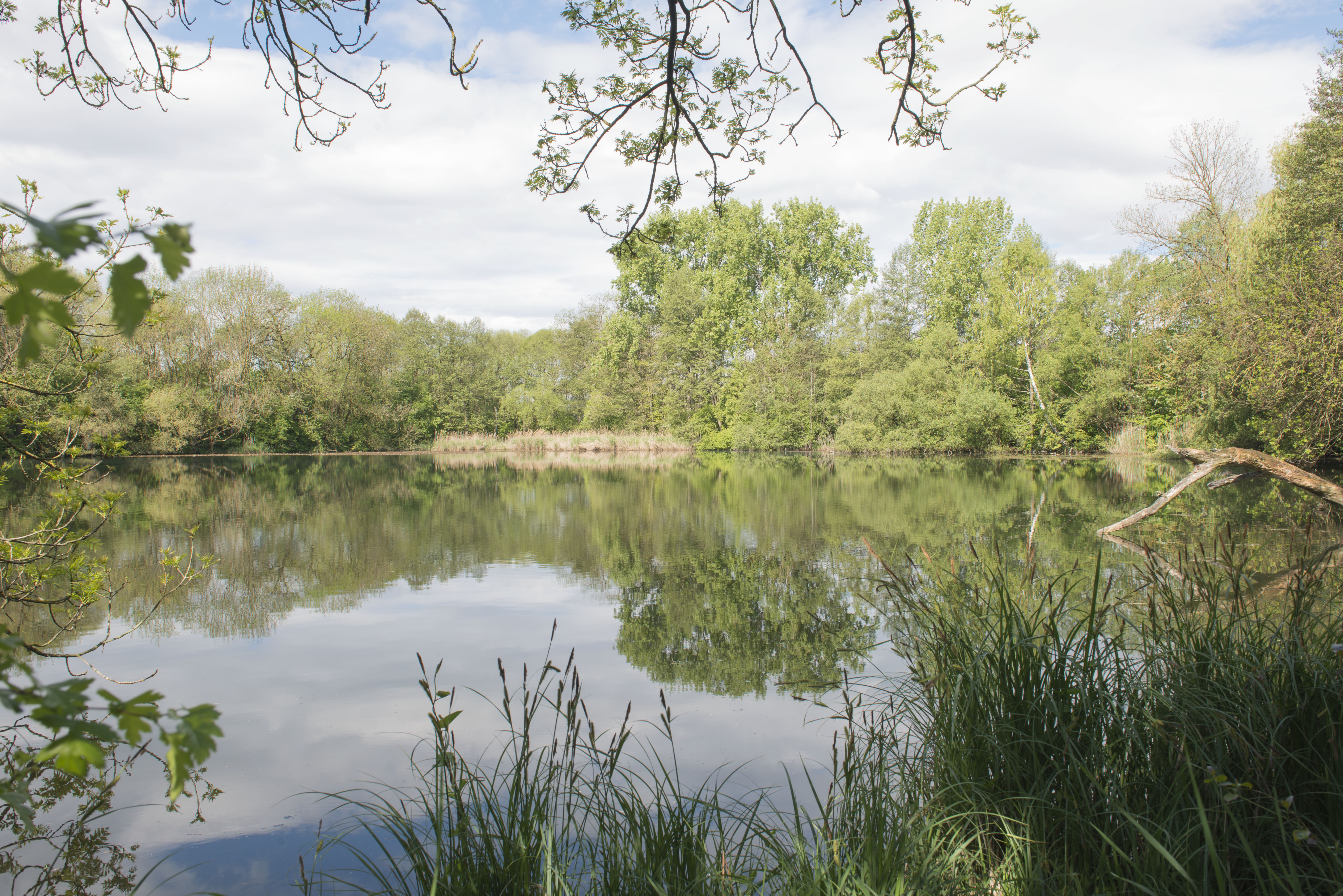 Denkendorfer Erlachsee